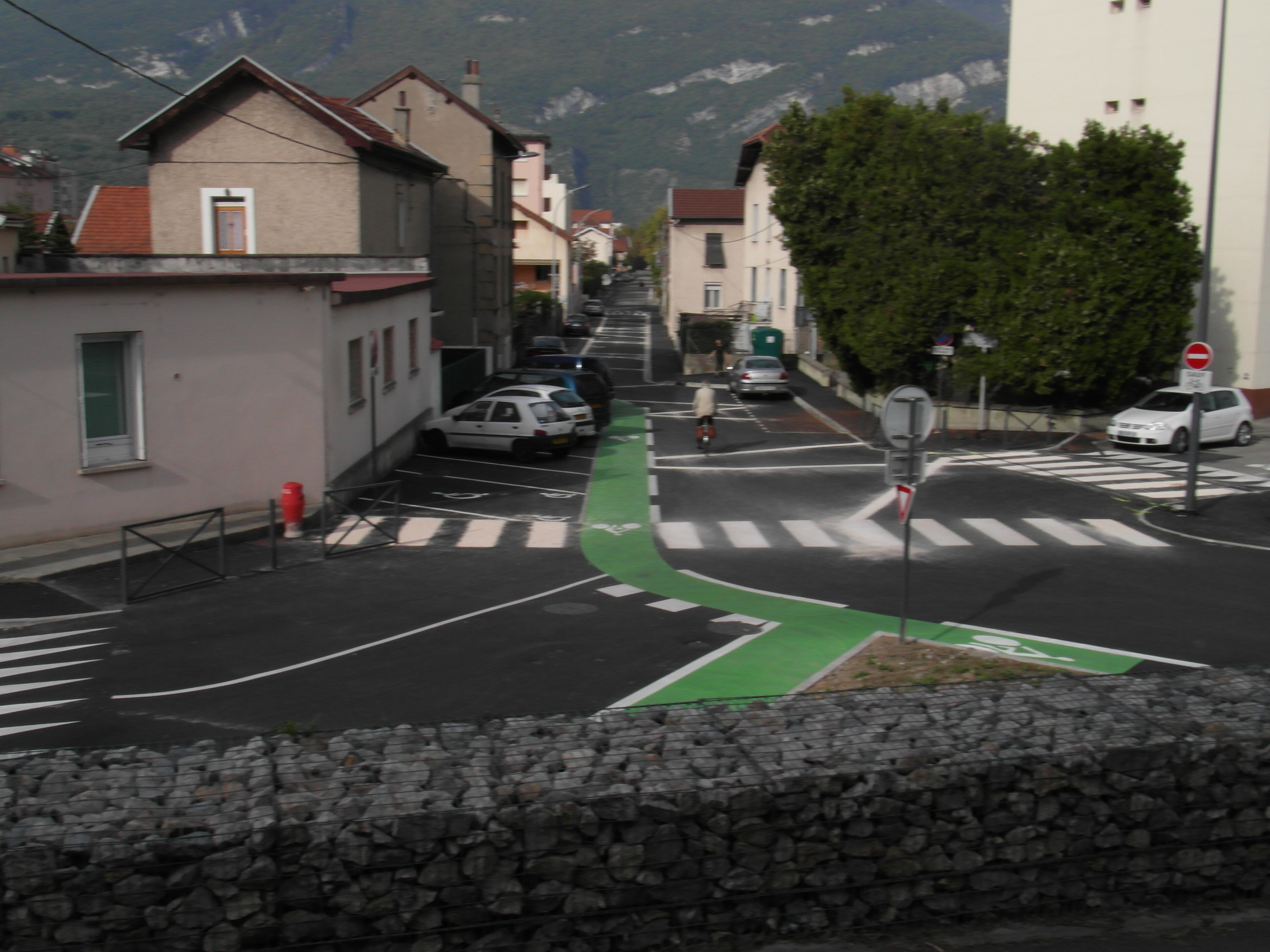 Rue charles Michels